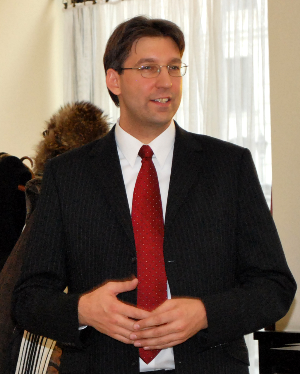 Adventfeier 2012